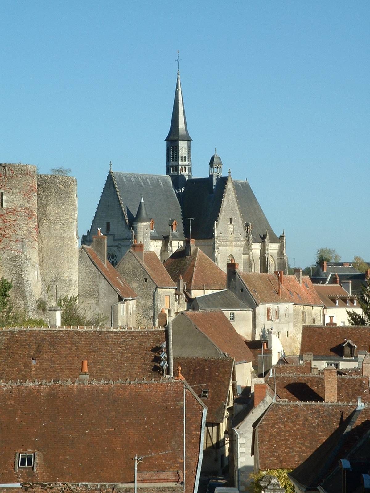 Vue de Montresor.jpg